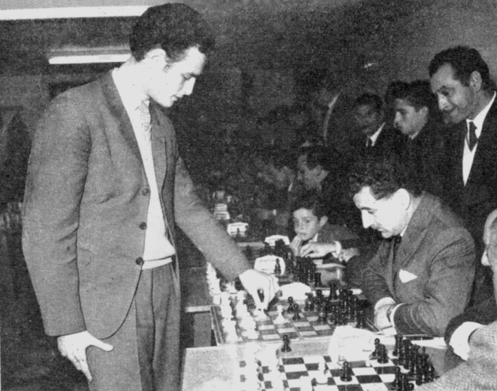 Carlos Bielicki, cuando era campeón mundial juvenil de ajedrez, en una serie de simultáneas en el Círculo Italiano de Junín, Argentina, en 1960. A la derecha, en primer plano, aparece osvaldo Catelli y el juvenil Adolfo Di Marco.